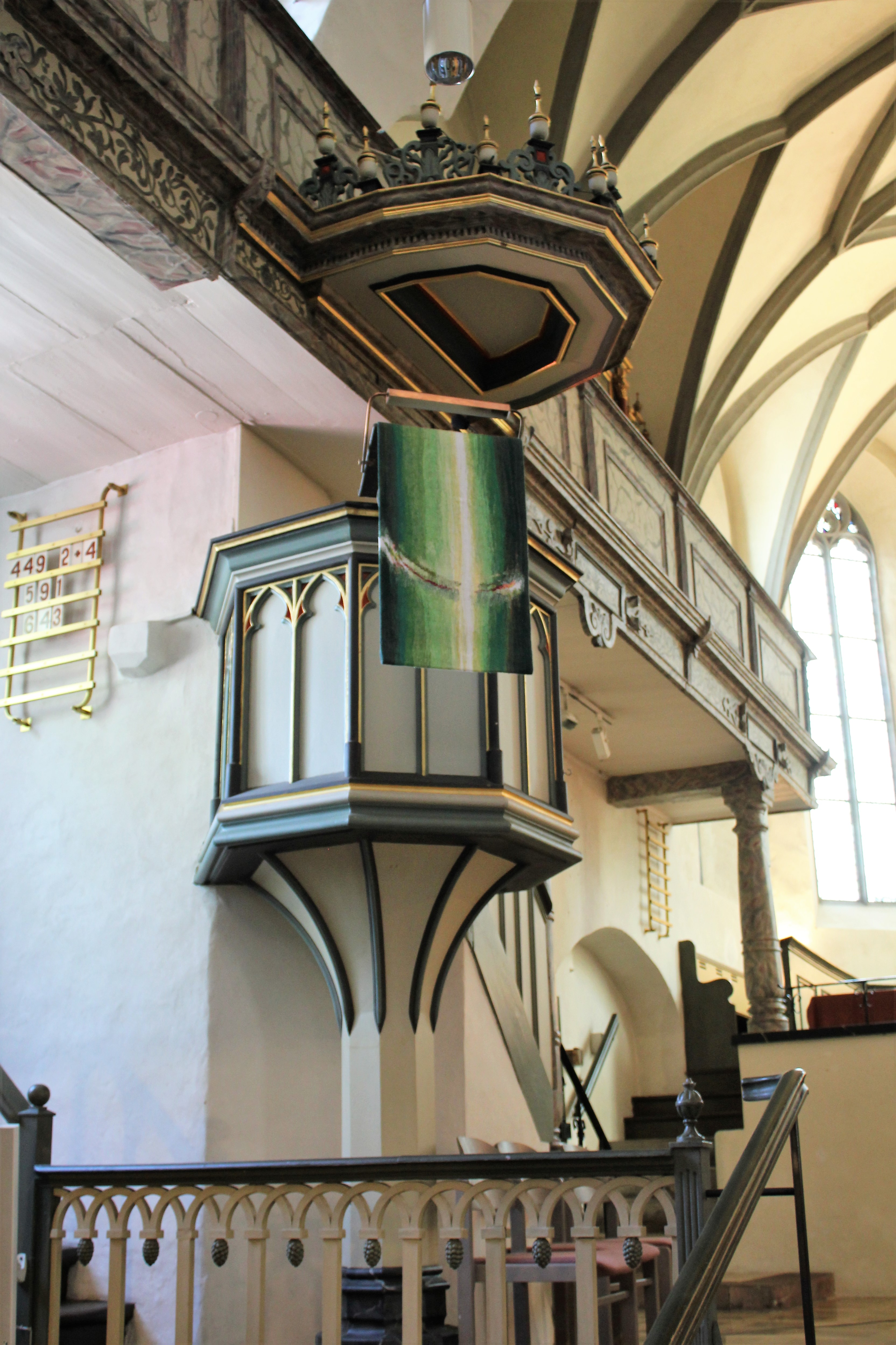 Evangelische Stadtkirche Dillenburg, Hessen, Deutschland